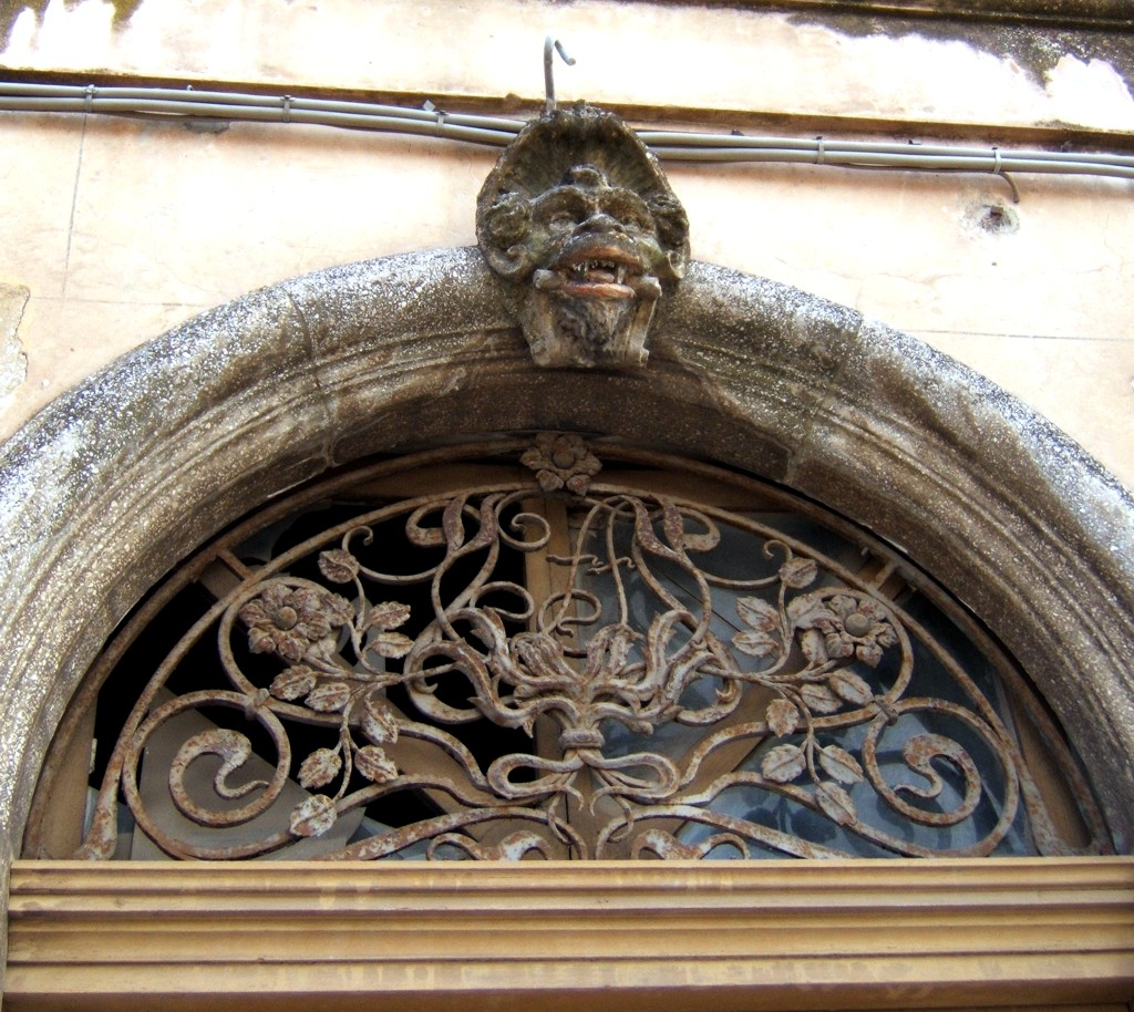 Fregio su portale 1800 - Cittanova (RC)